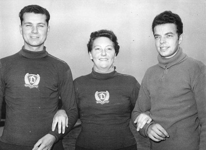 Helmut Kuhnert, Inge Görmer, Erich Löwenberger Zentralbild Funck-28.9.1955 Wjt-Qu- Zur Auszeichnng mit dem Titel "Meister des Sports" am 1.10.1955 vorgeschlagen: vlnr Die Eisschnelläufer: Helmut Kuhnert, Inge Görmer, beide SC Dynamo Berlin und Erich Löwenberger, SC Einheit, Berlin. Achtung Redaktionen: Zur Veröffentlichung frei nach offizieller Auszeichnung. Abgebildete Personen: Kuhnert, Helmut: Eisschnelläufer, Olympiateilnehmer 1956, Trainer, DDR Görmer, Inge: Eisschnelläuferin, Olympiateilnehmerin 1960, DDR Löwenberger, Erich: Eisschnelläufer, Olympiateilnehmer 1956, DDR